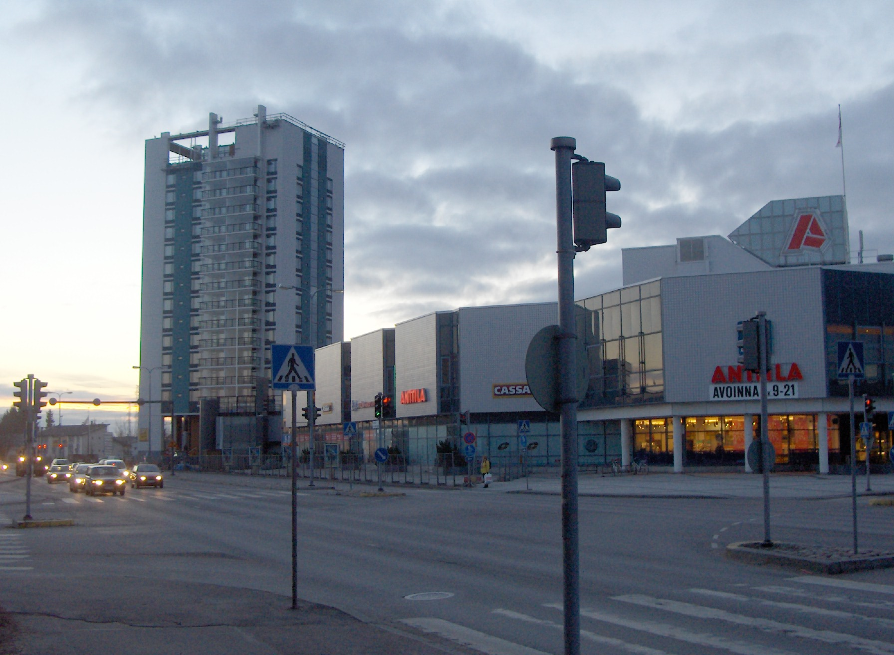 Vasemmalla Kielotorni ja oikealla Anttilan rakennus Tikkurilassa.